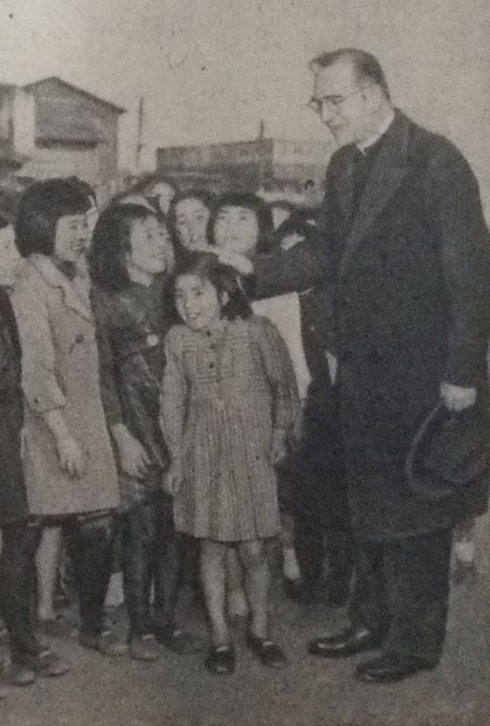 1947年の訪日時のフラナガン神父